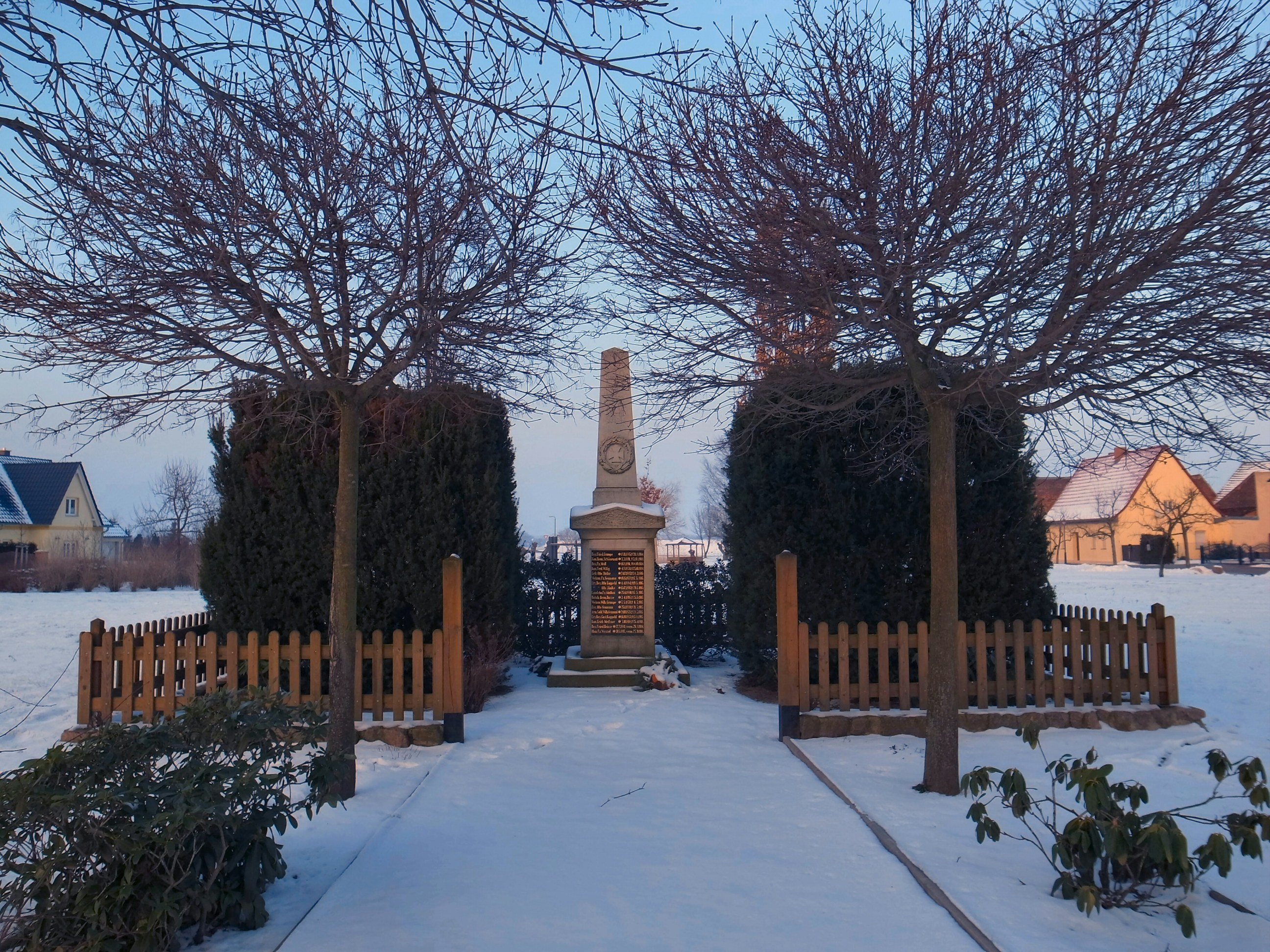 Gohrau,Kriegerstein,Gefallenendenkmal